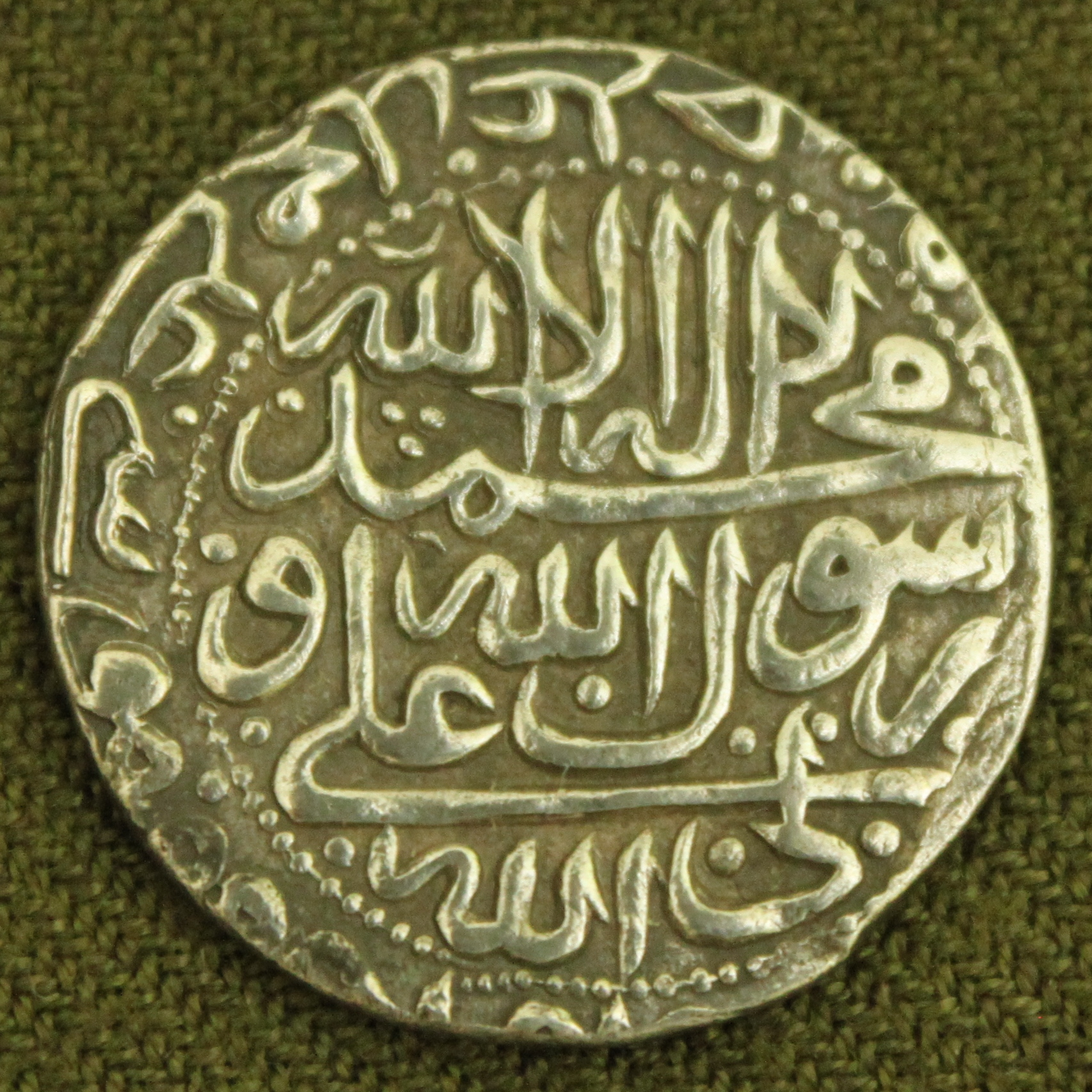 عملة معدنية ضُربت في عهد الشاه عبَّاس الثالث الصفوي، يظهر عليها نقش الشهادتان إلى جانب الشهادة الثالثة عند الشيعة.